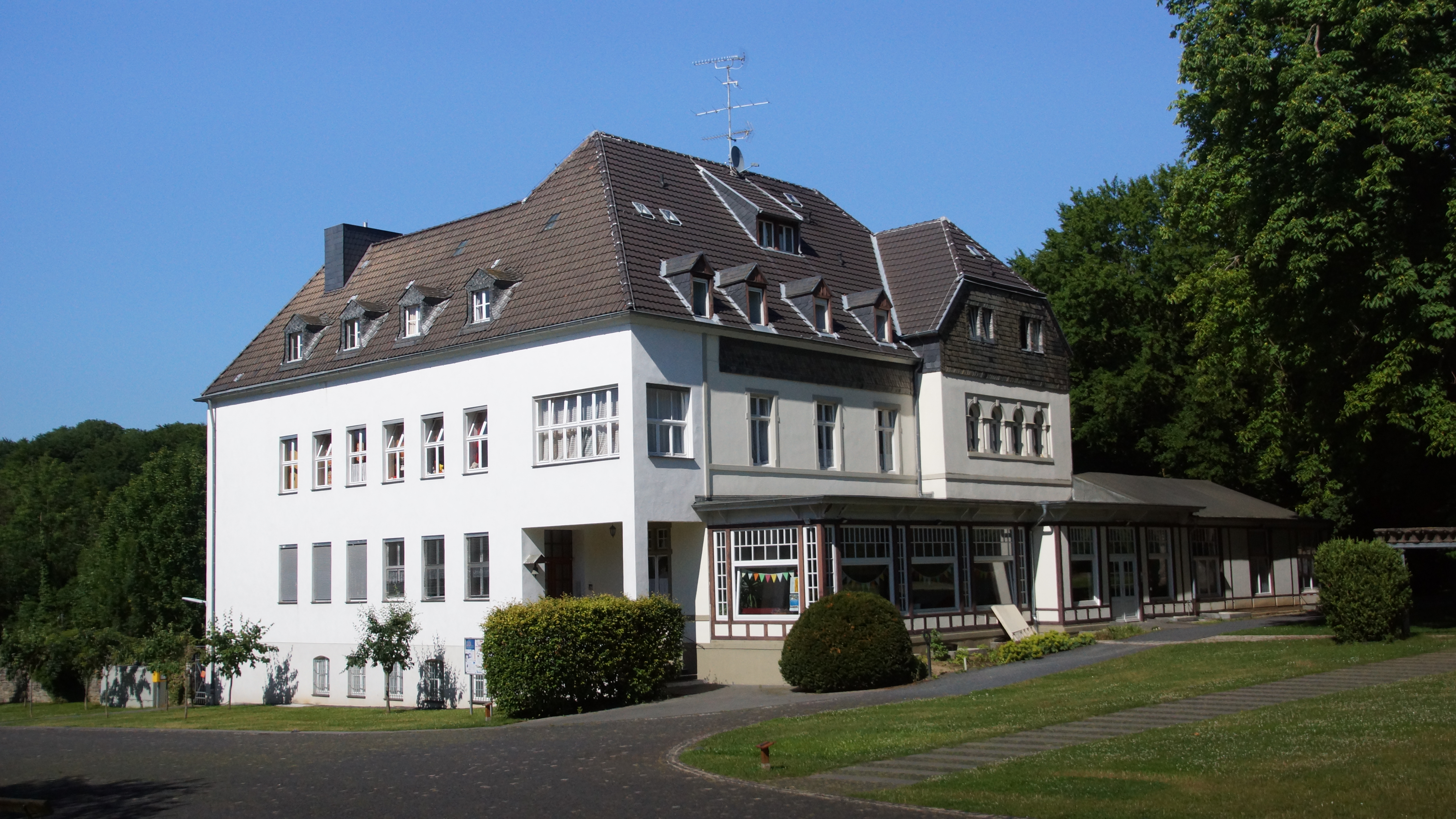 Haus Heisterbach (ehemaliges Hotel, erbaut 1902) auf dem Gelände von Kloster Heisterbach. Haus Heisterbach ist ein Wohnhaus für schwangere und alleinerziehende Frauen und ihre Kinder, verbunden mit einem Hilfs- und Informationszentrum.